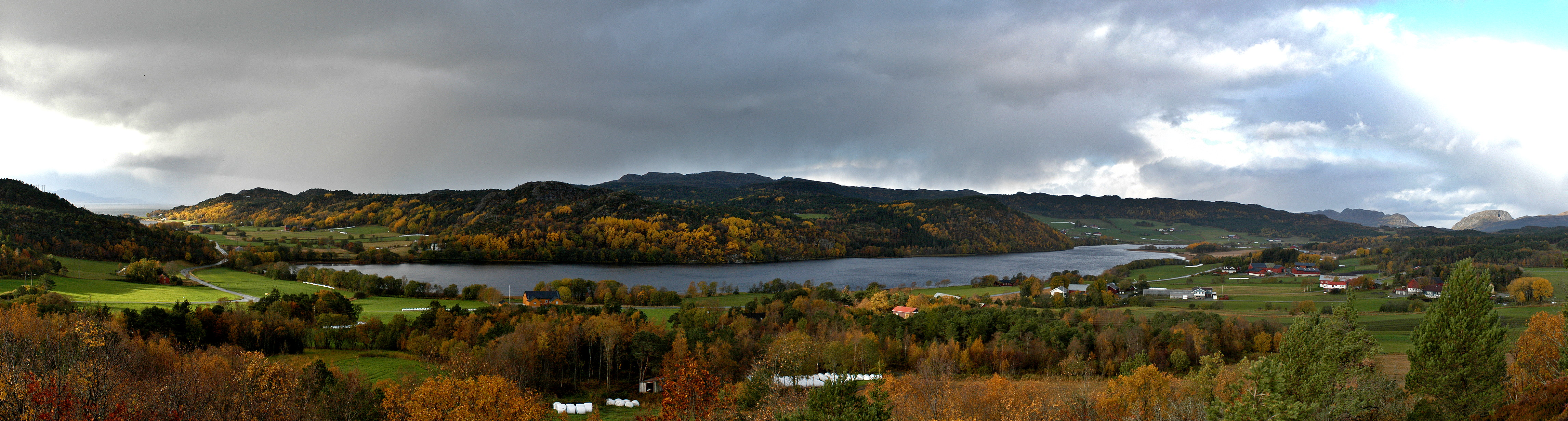 Eidsvatnet, Bjugn